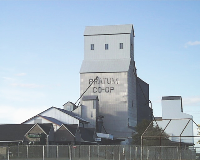 Grain elevator in Pratum, Oregon